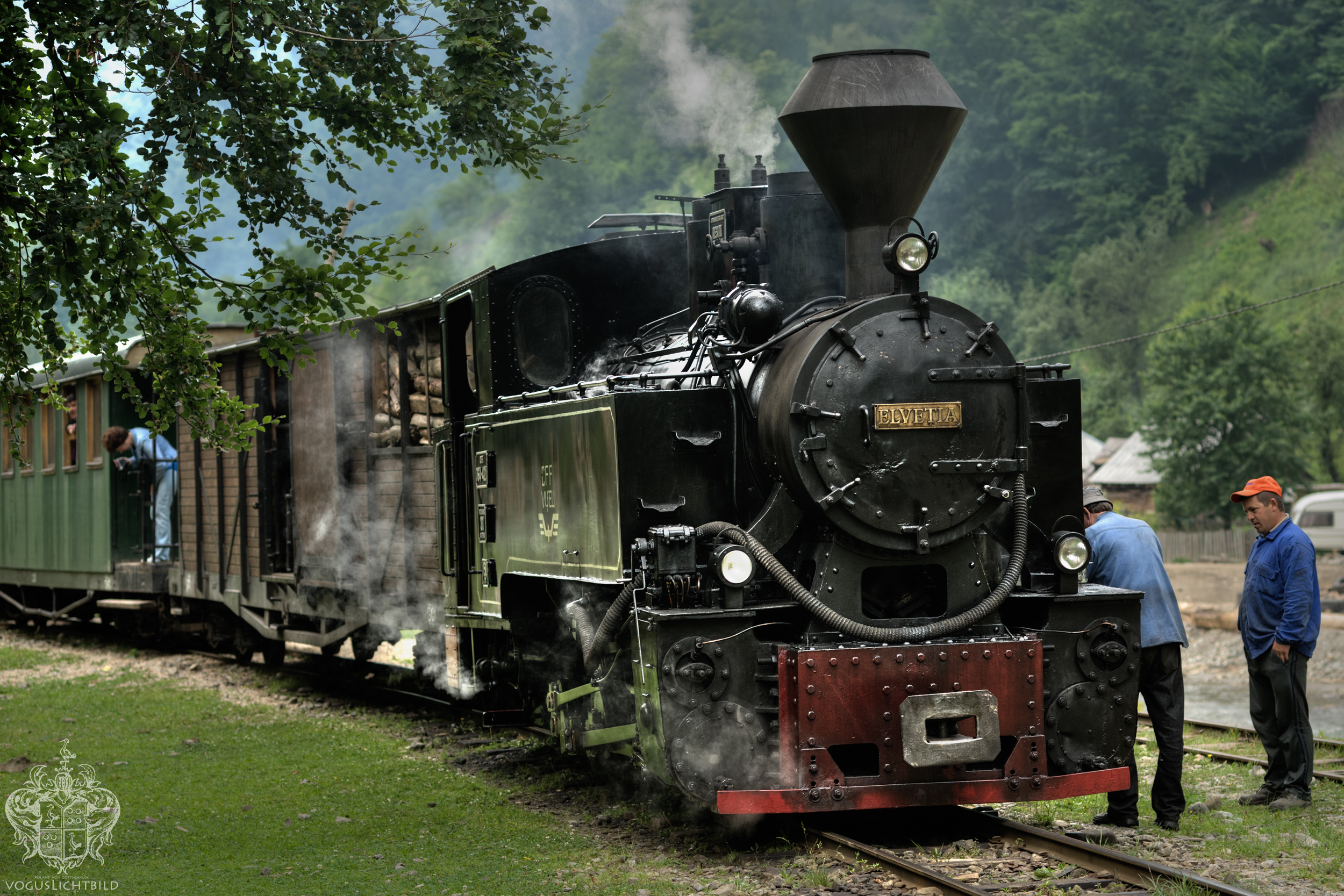 Lok 'Elvetia' am Haltepunkt Paltin, wo Holz geladen wird